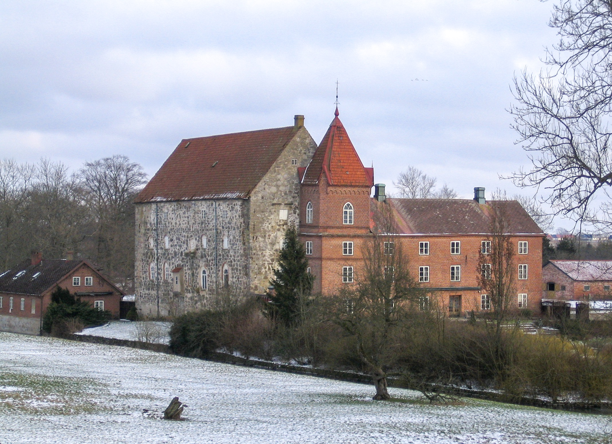 Örup castle in Skåne, Sweden